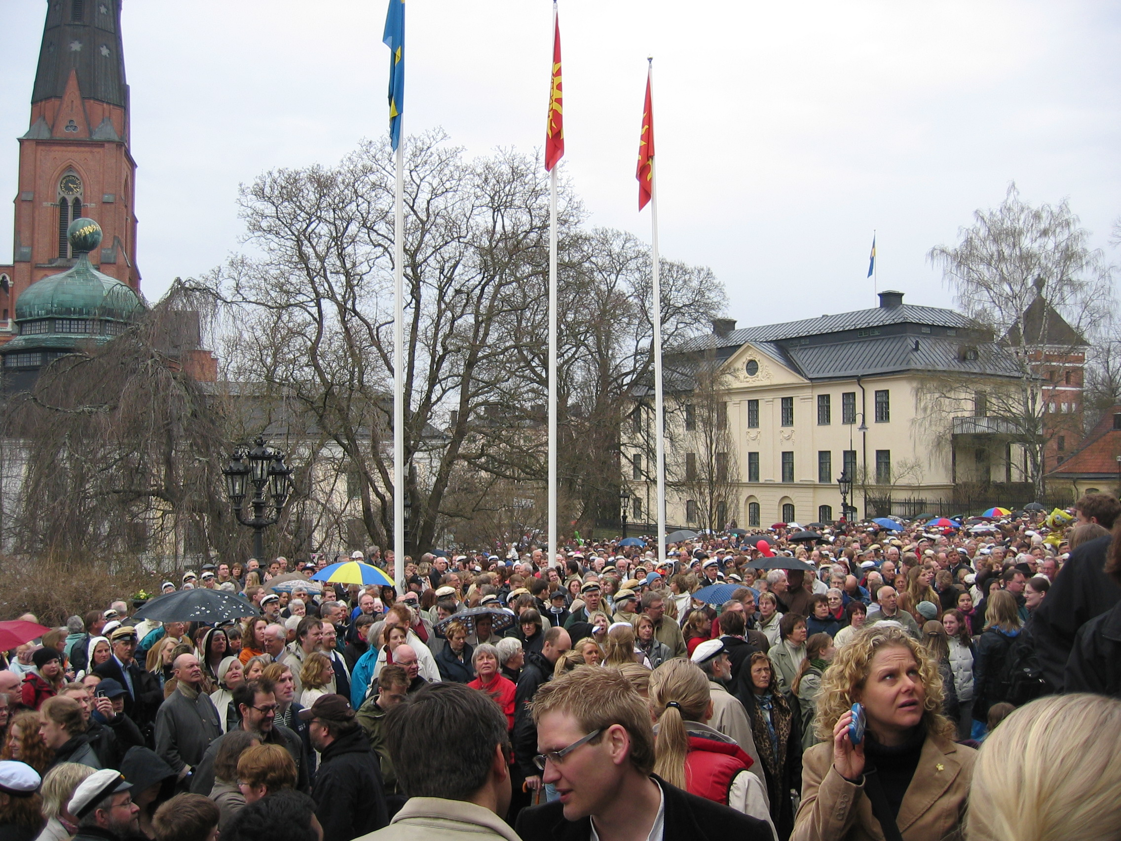 Valborg i Universitetsparken i Uppsala